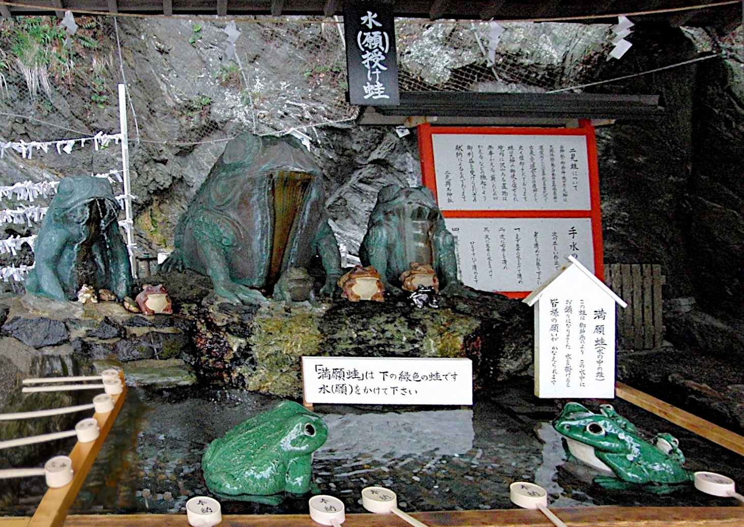 Sakurai Futamigaura List of Places of Scenic Beauty of Japan (Fukuoka) de Itoshima au Japon